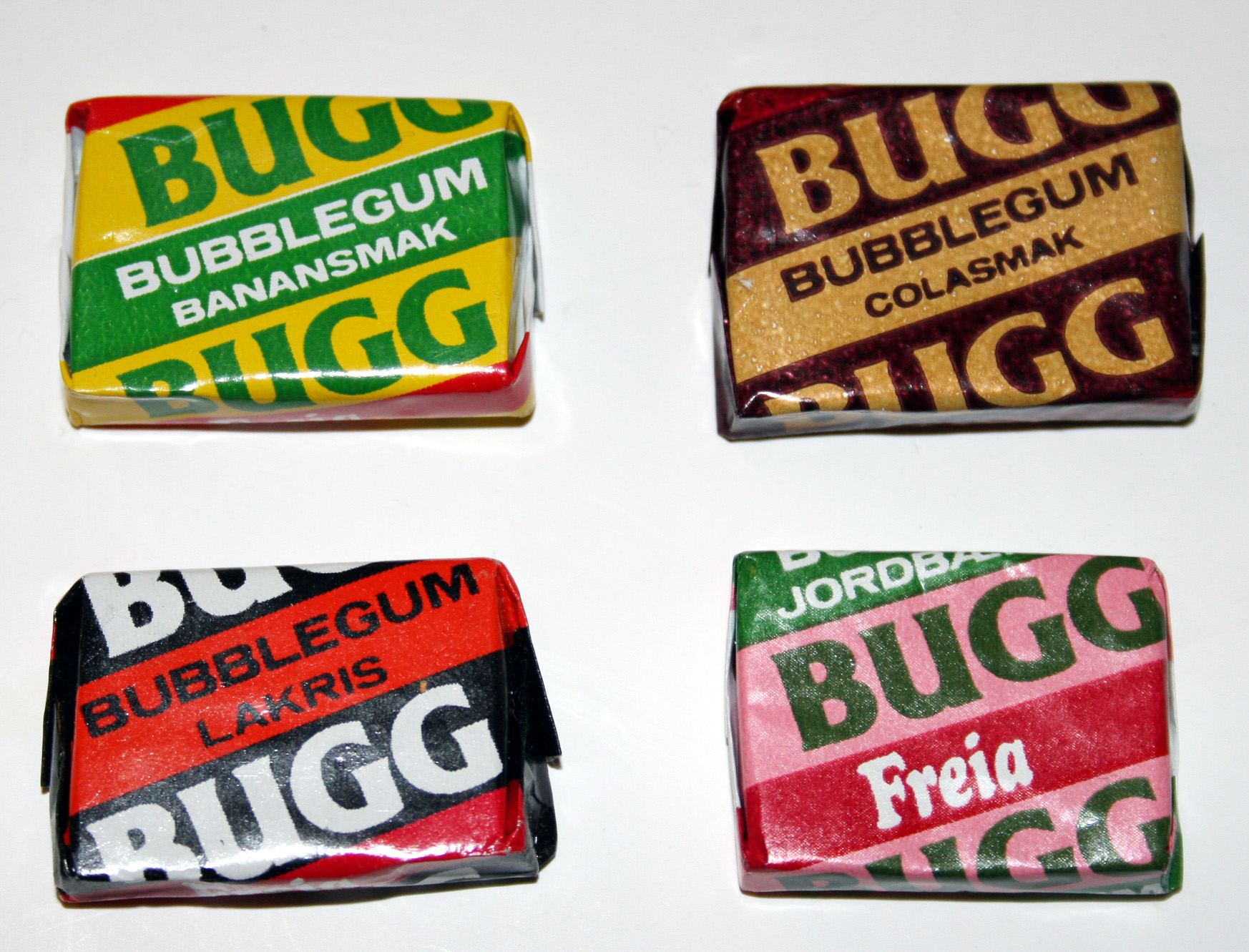 Bugg. Smaksvarianter som ble lansert i årene 1980-82. Banan, cola, lakris og jordbær.